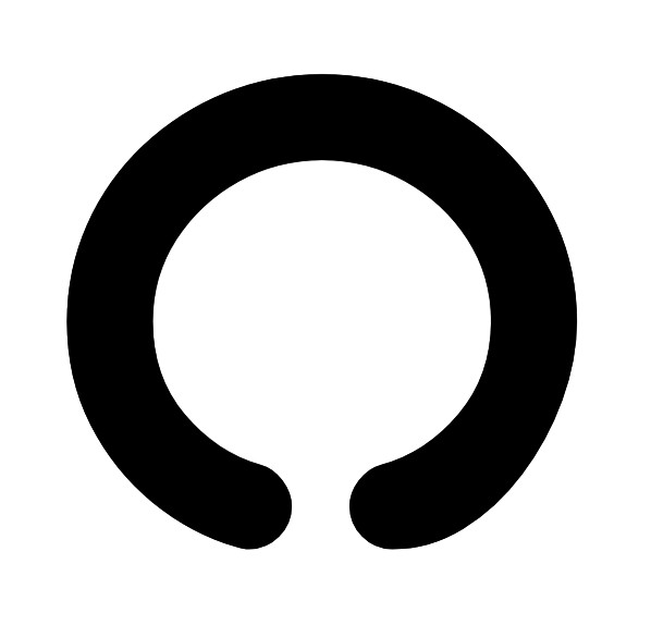 റ മലയാളം അക്ഷരം